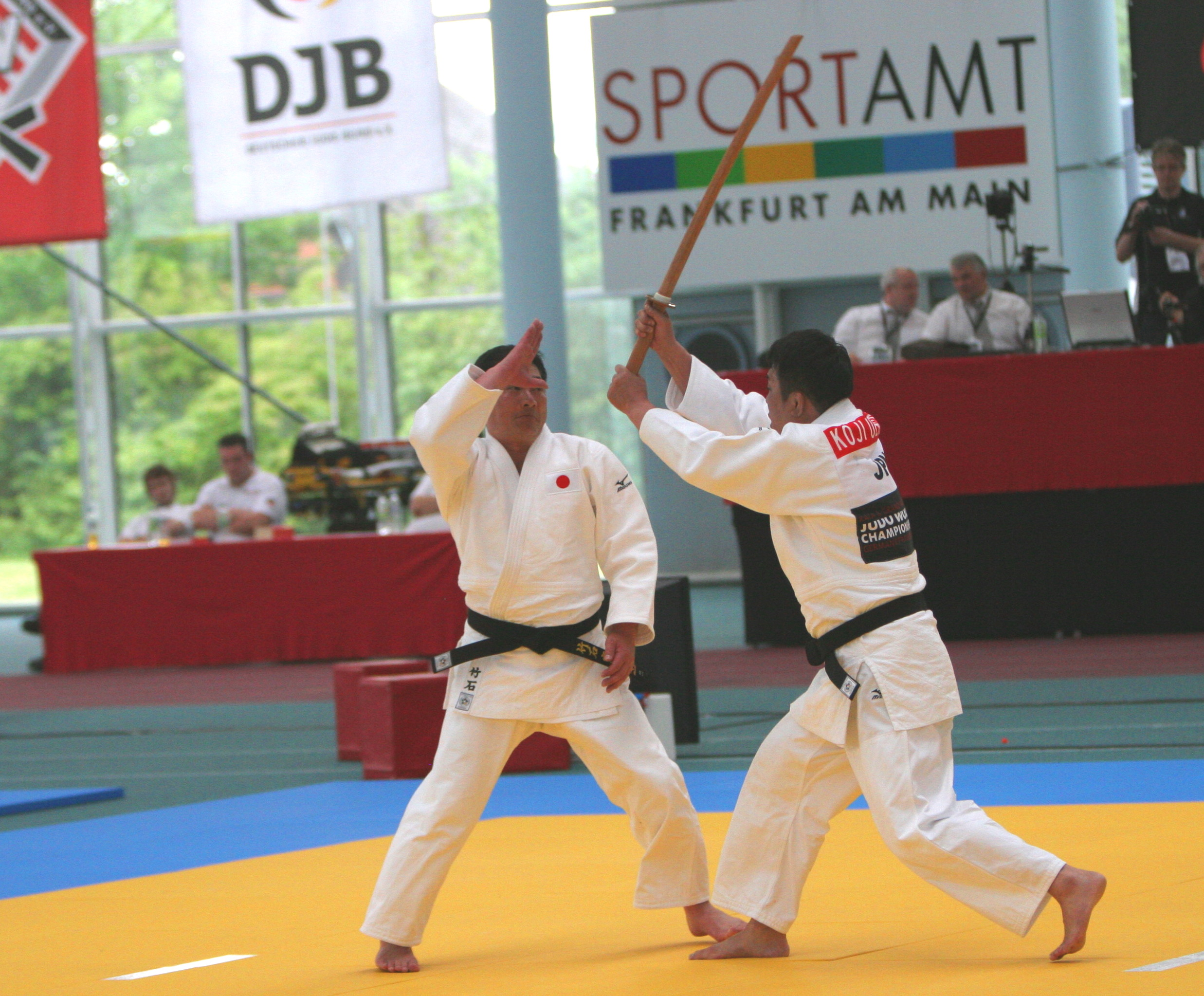 世界形選手権大会・極の形日本チームの演技